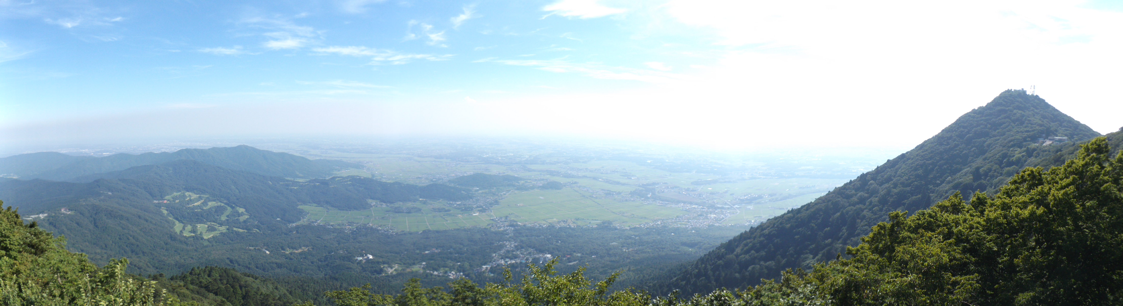 筑波山ロープウェイ女体山駅にある展望台からの眺め